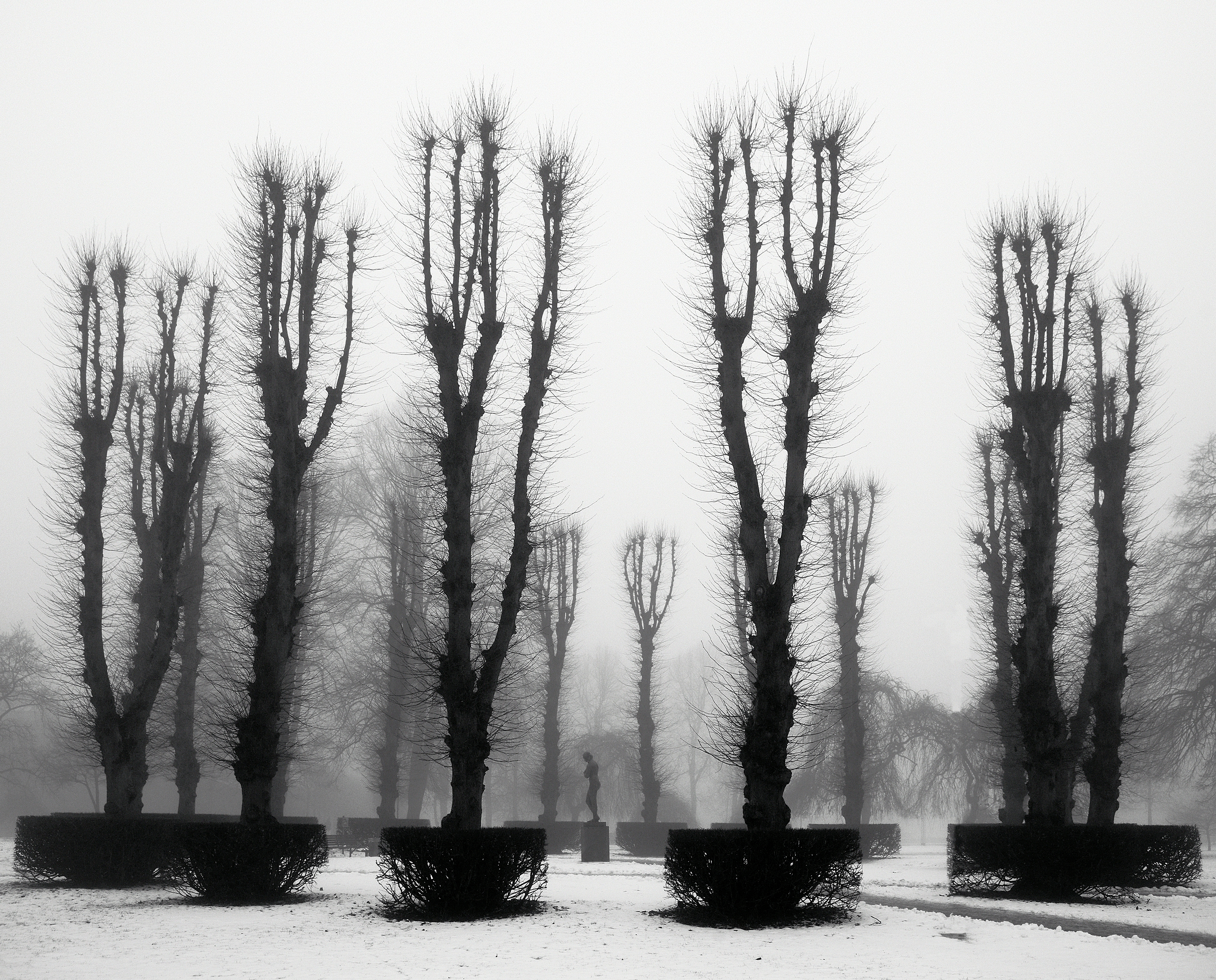 Aarhus